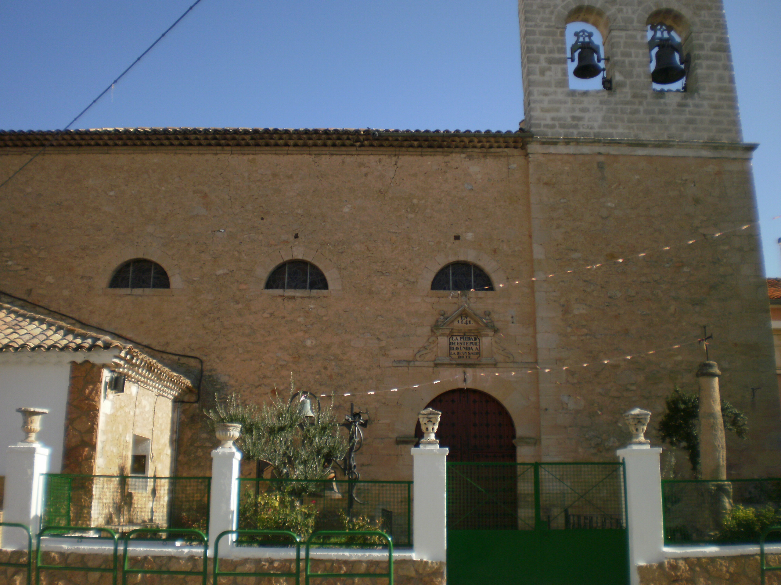 Cuencako herria eta bertako Museo Etnografikoa.